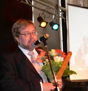 A-klinikkasäätiön viestintäjohtaja Teuvo Peltoniemi vastaanottaa "Vuoden tiedottaja 2006" riimusauvan.